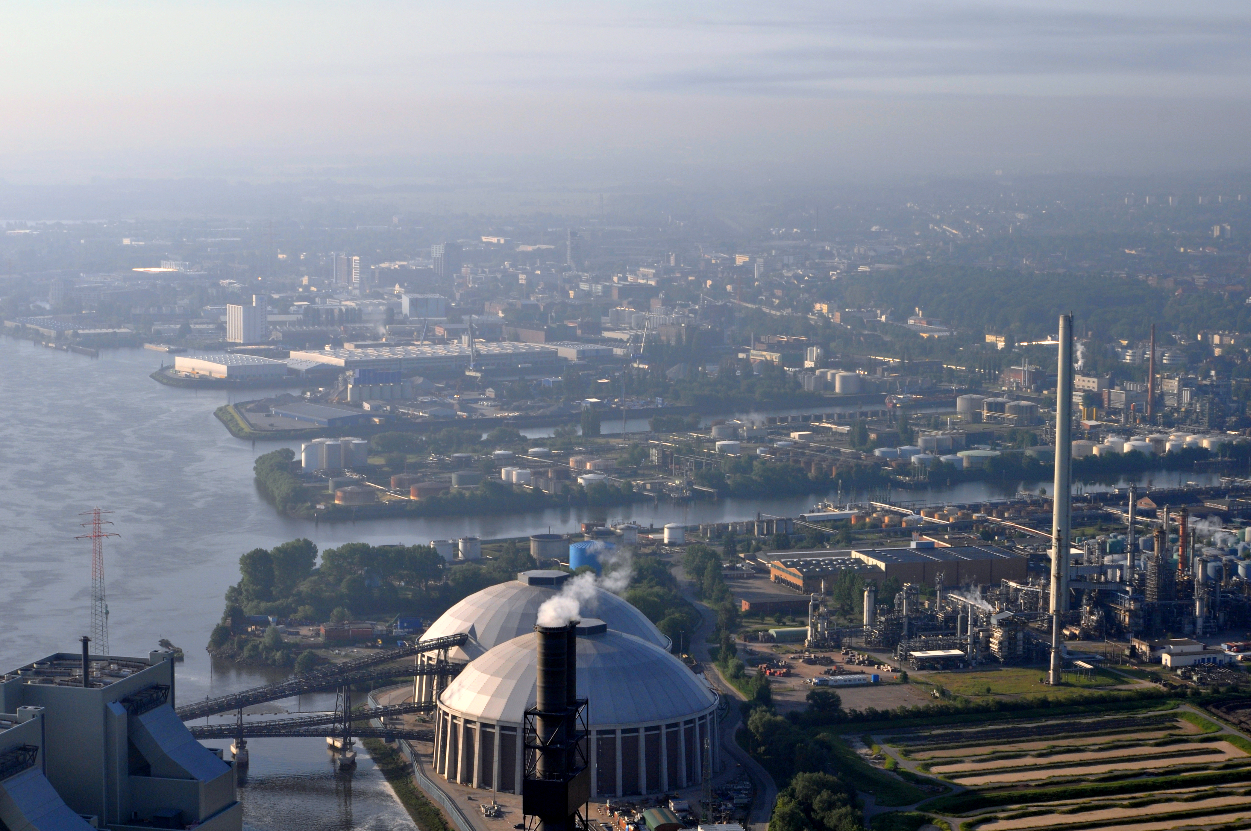 Seehäfen 1-4 in Hamburg-Heimfeld, im Vordergrund das Steinkohlekraftwerk Moorburg in Hamburg-Moorburg.